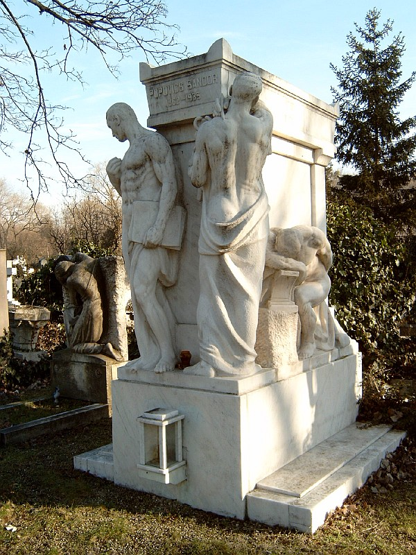 Kezdőlap Popovits Sándor (név előford.: Popovics) (Pest, 1862. október 22. – Budapest, 1935. április 15.) pénzügyminiszter, a Magyar Nemzeti Bank elnökének sírja Budapesten. Kerepesi temető: 34-1-96 [szobrász: Horvay János]